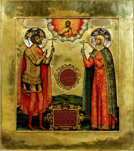 Икона "Св. Федор Стратилат и вмч. Агафья". М. Милютин. Оружейная палата. 1680—1681 гг. Дерево, левкас, темпера. Оклад: золото, серебро, ползолота, эмаль. Вклад царя Федора Алексеевича и царицы Агафьи Семеновны Грушецкой в Александровский Успенский монастырь.